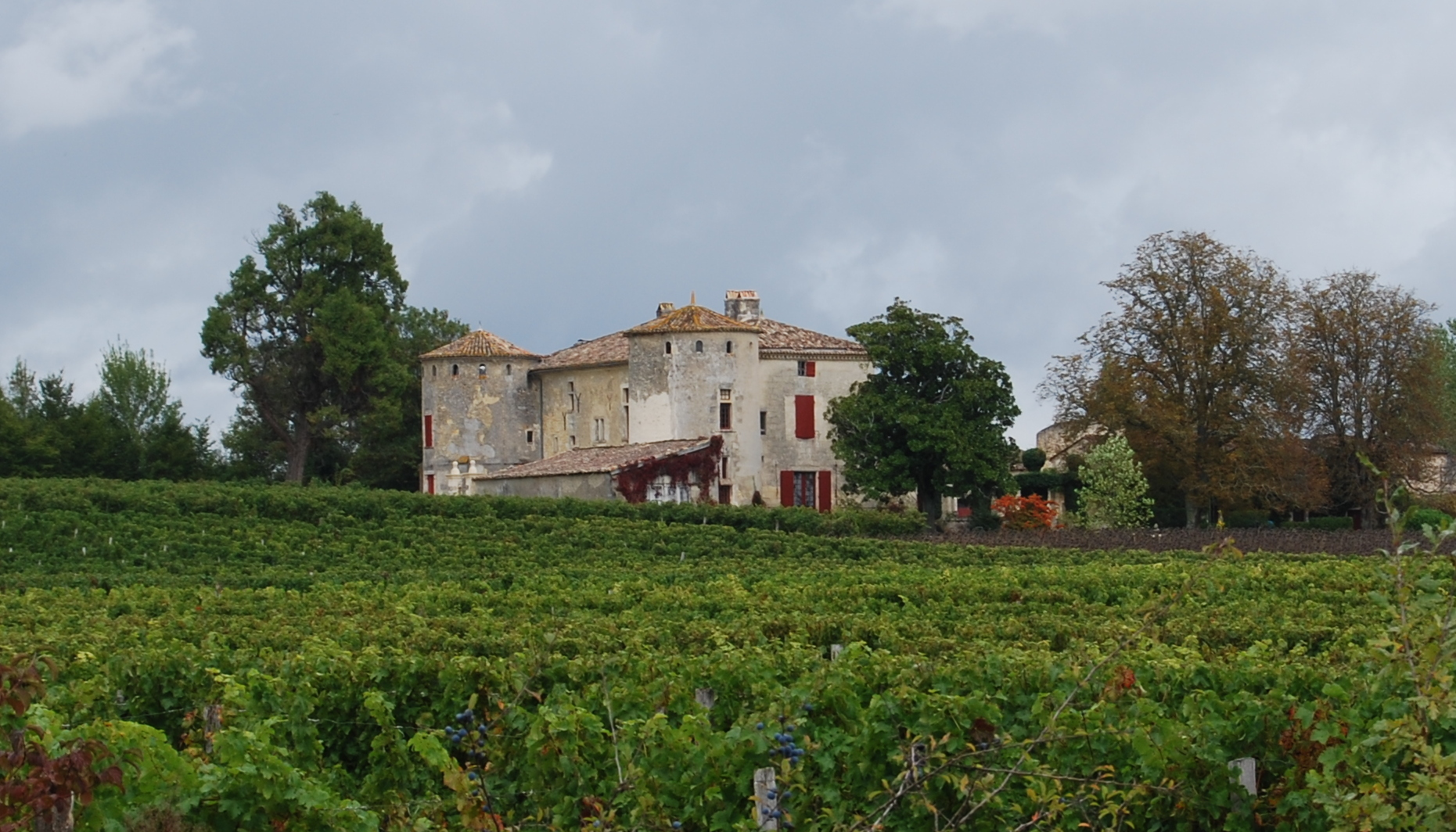 Château de Châteauneuf, (Inscrit, 1988)